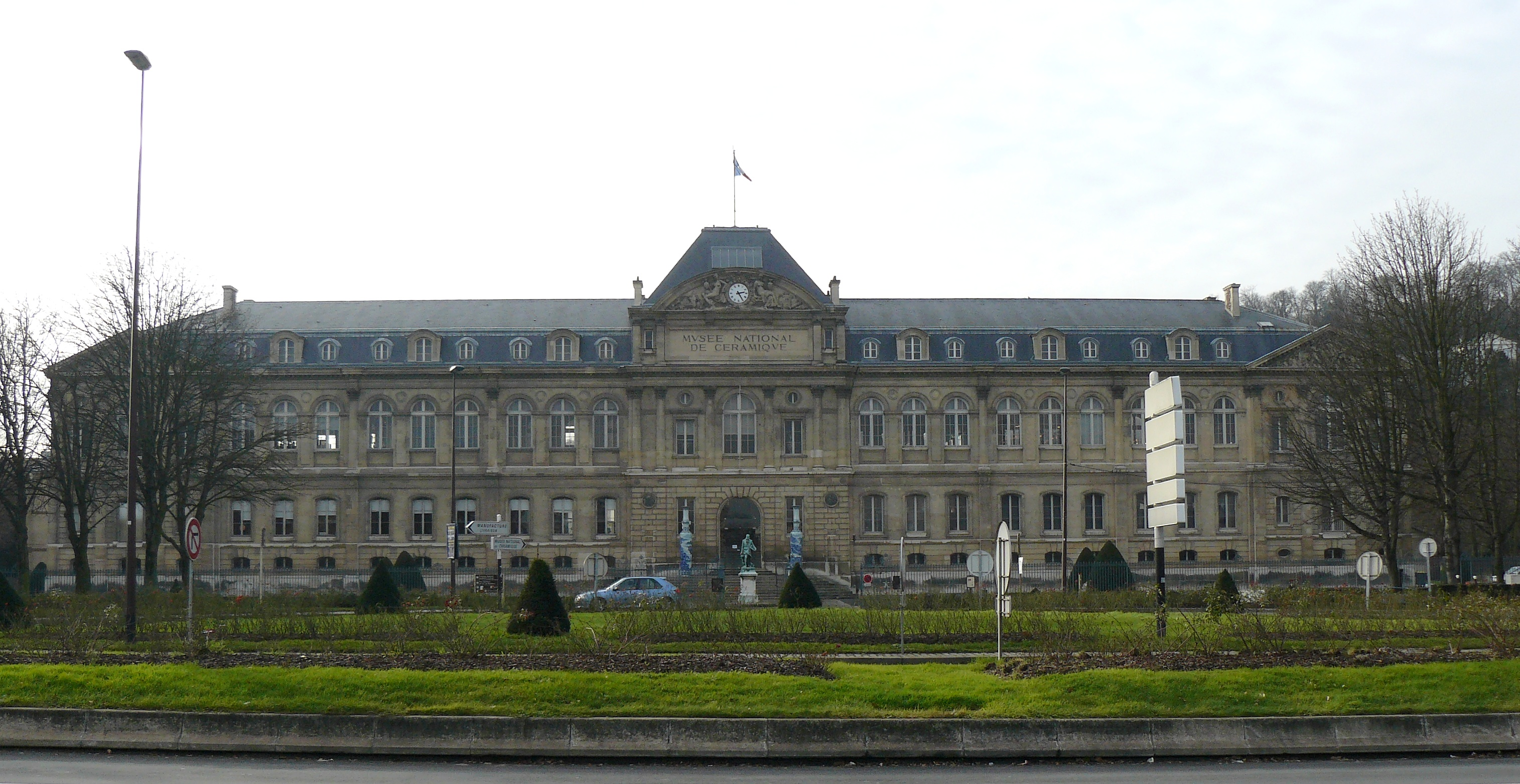 Bâtiment du musée national de la céramique (1876), à Sèvres (Hauts-de-Seine), à coté de la manufacture des porcelaines de Sèvres.